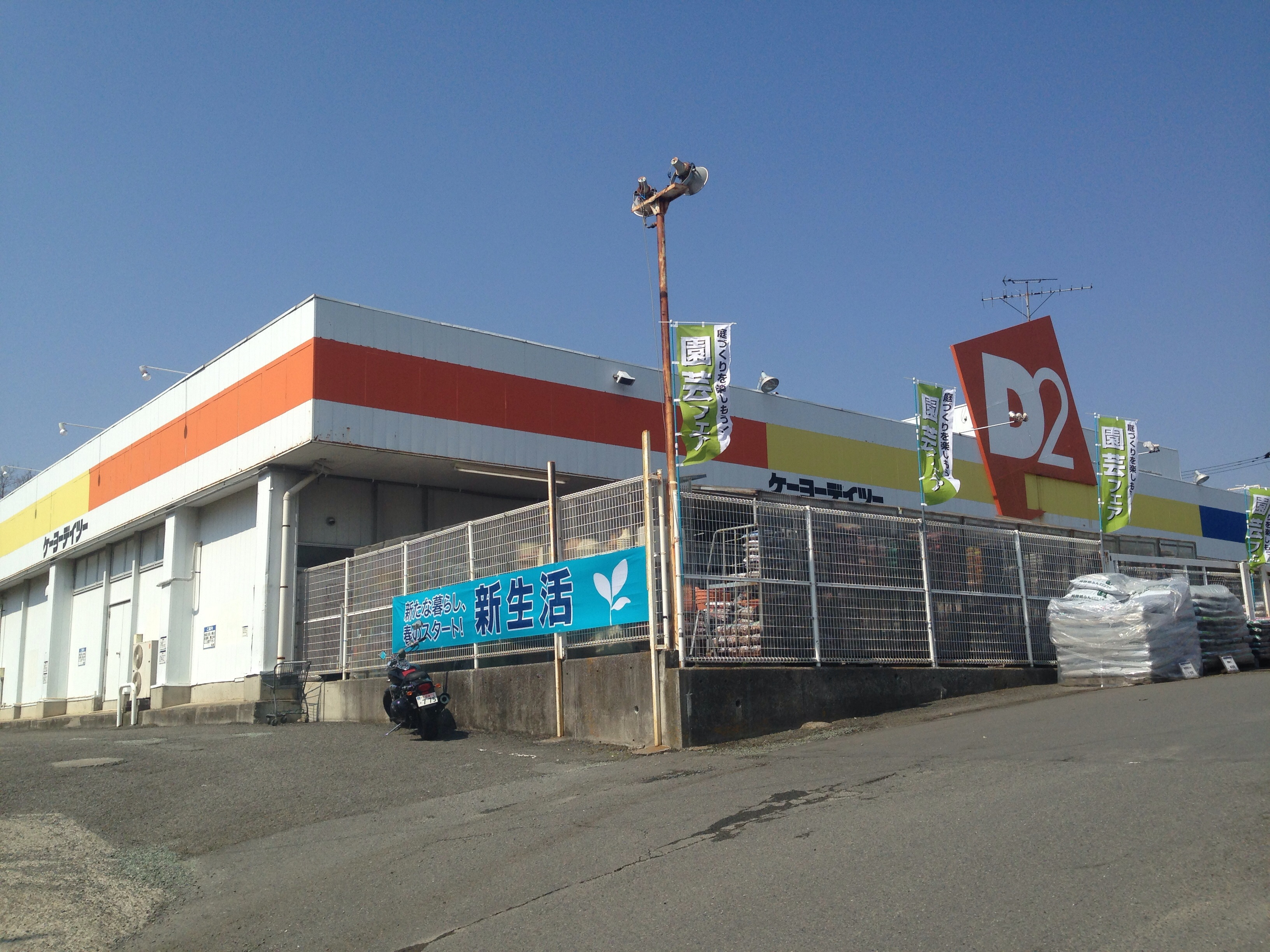 ケーヨーデイツー湘南台店、旧デザインの店舗。